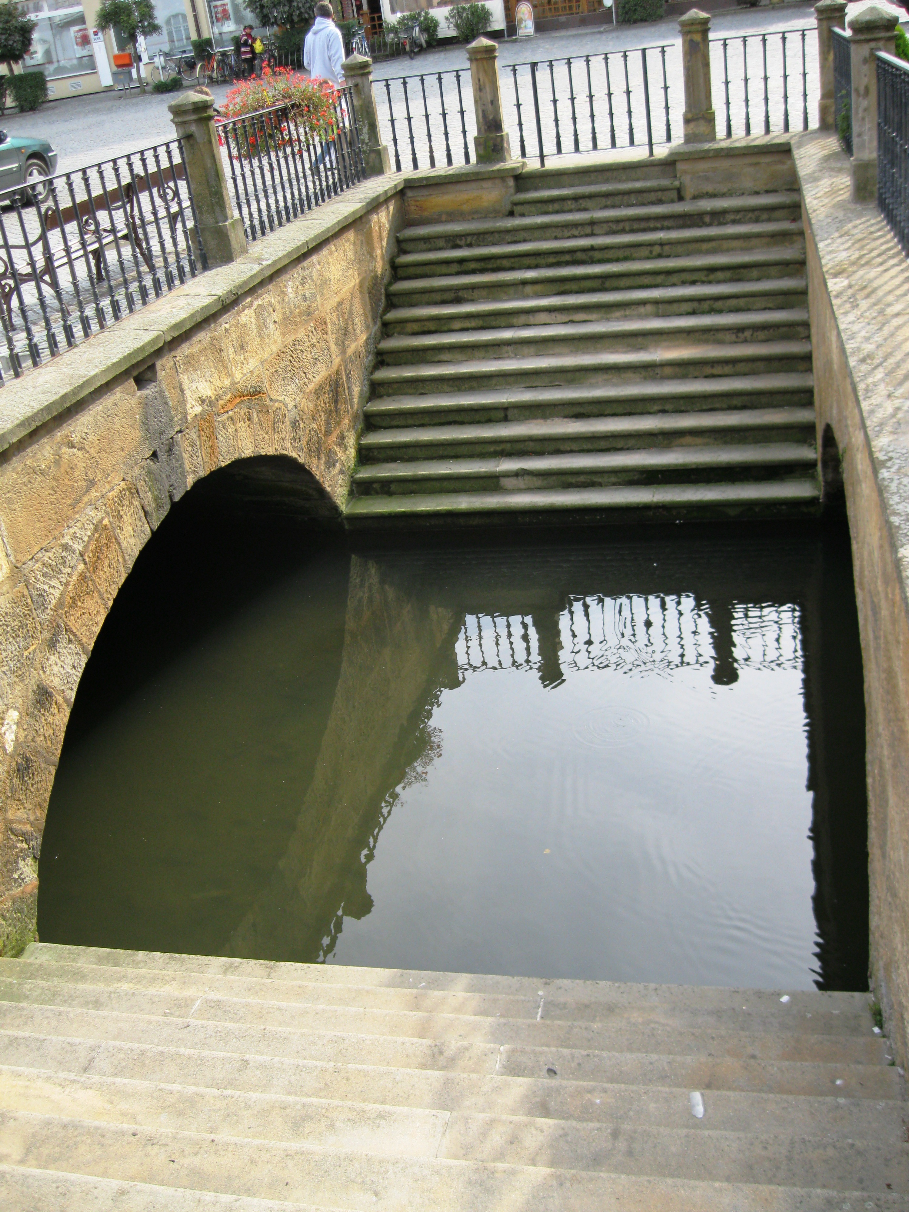 Schodiště - přístup k rameni Moravy (Nečízu) (Litovel), nám. Přemysla Otakara, Litovel